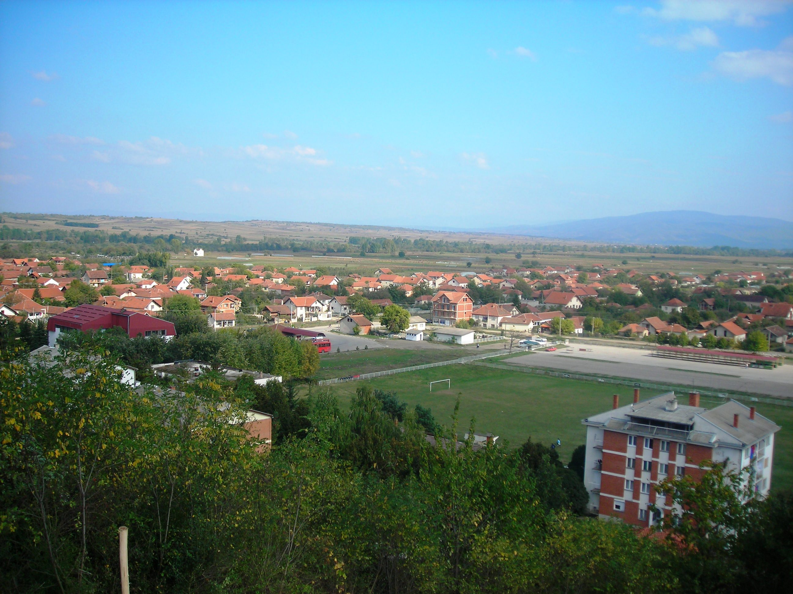 Панорама Житорађа. Сликано са брда изнад центра села.